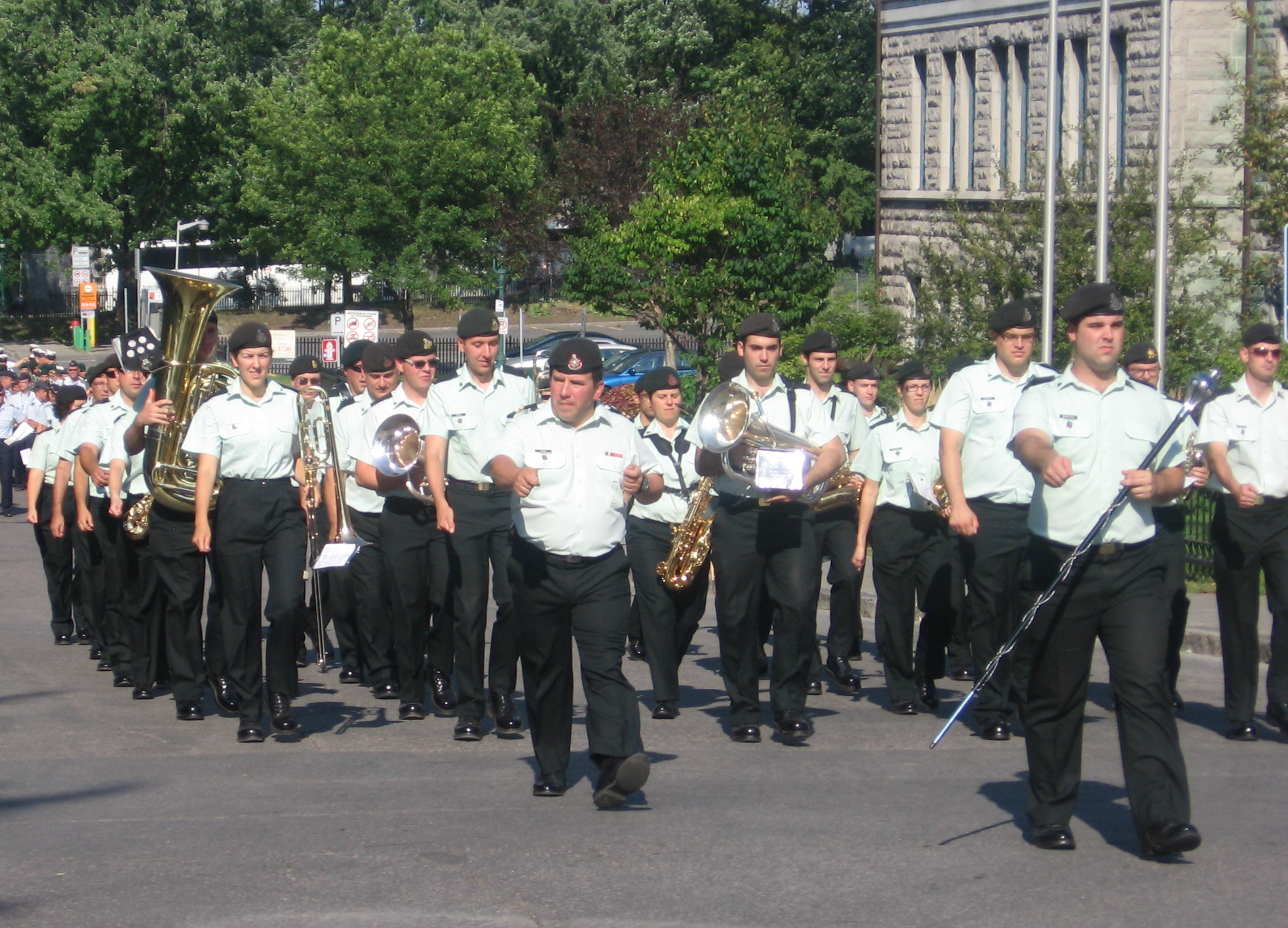 Fanfare militaire des Voltigeurs de Québec